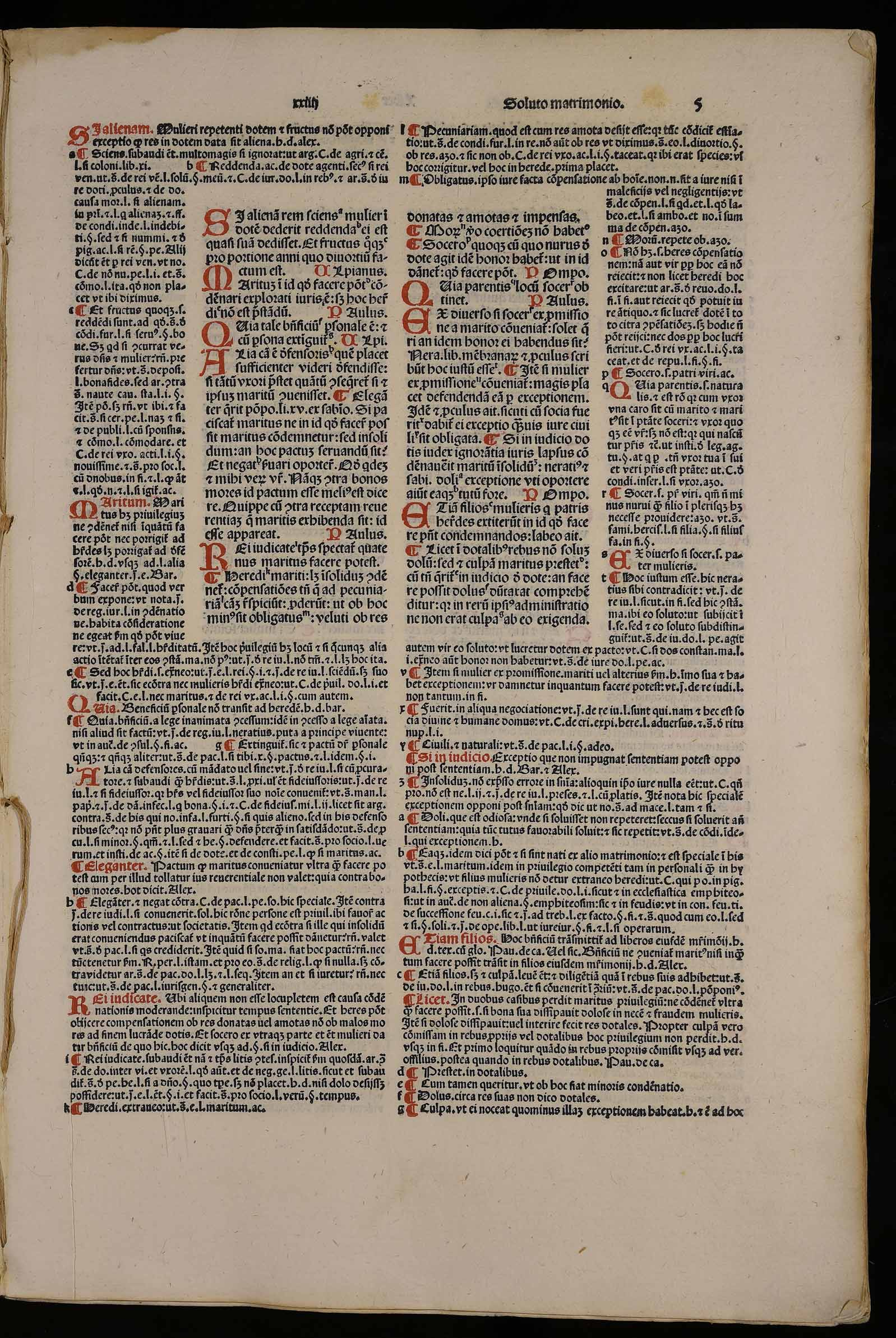 Corpus iuris civilis. Digestum Infortiatum de Tortis.